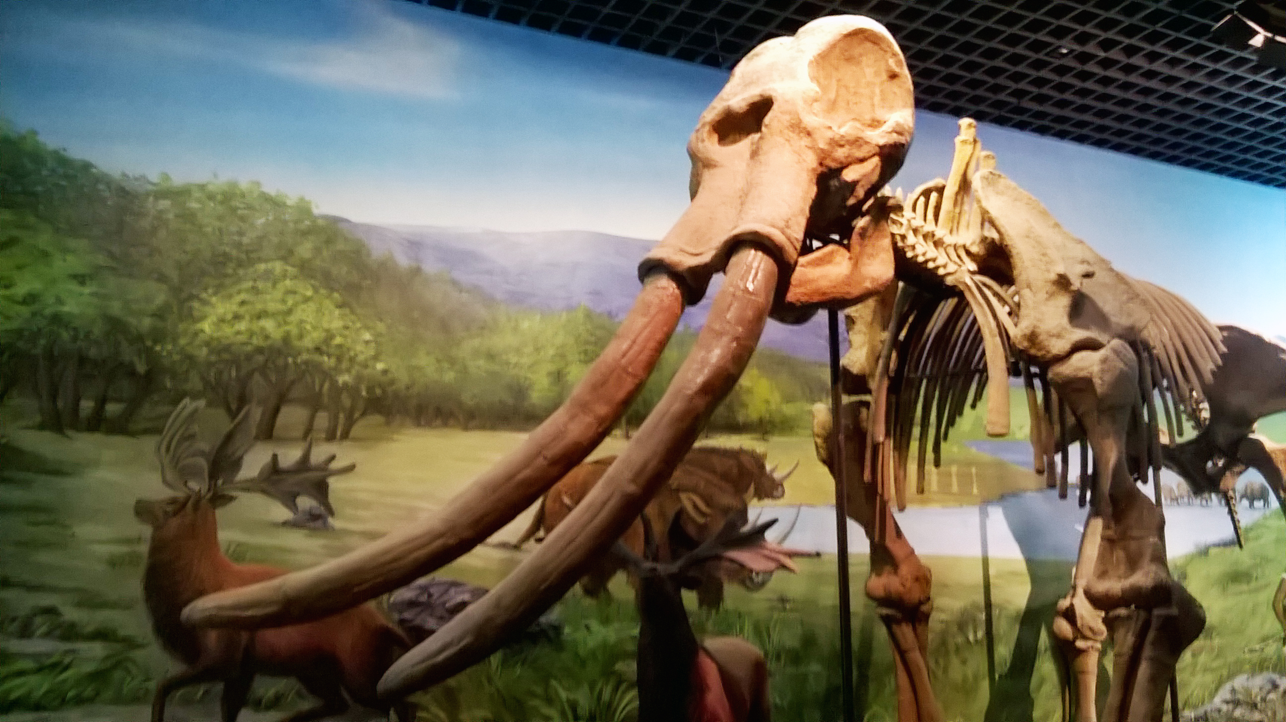 诺氏古菱齿象（Palaeoloxodon naumanni）化石。内蒙古博物院馆藏。